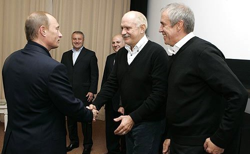 Владимир Путин со съемочной группой фильма «12». Справа: режиссер Никита Михалков, актер Сергей Гармаш.